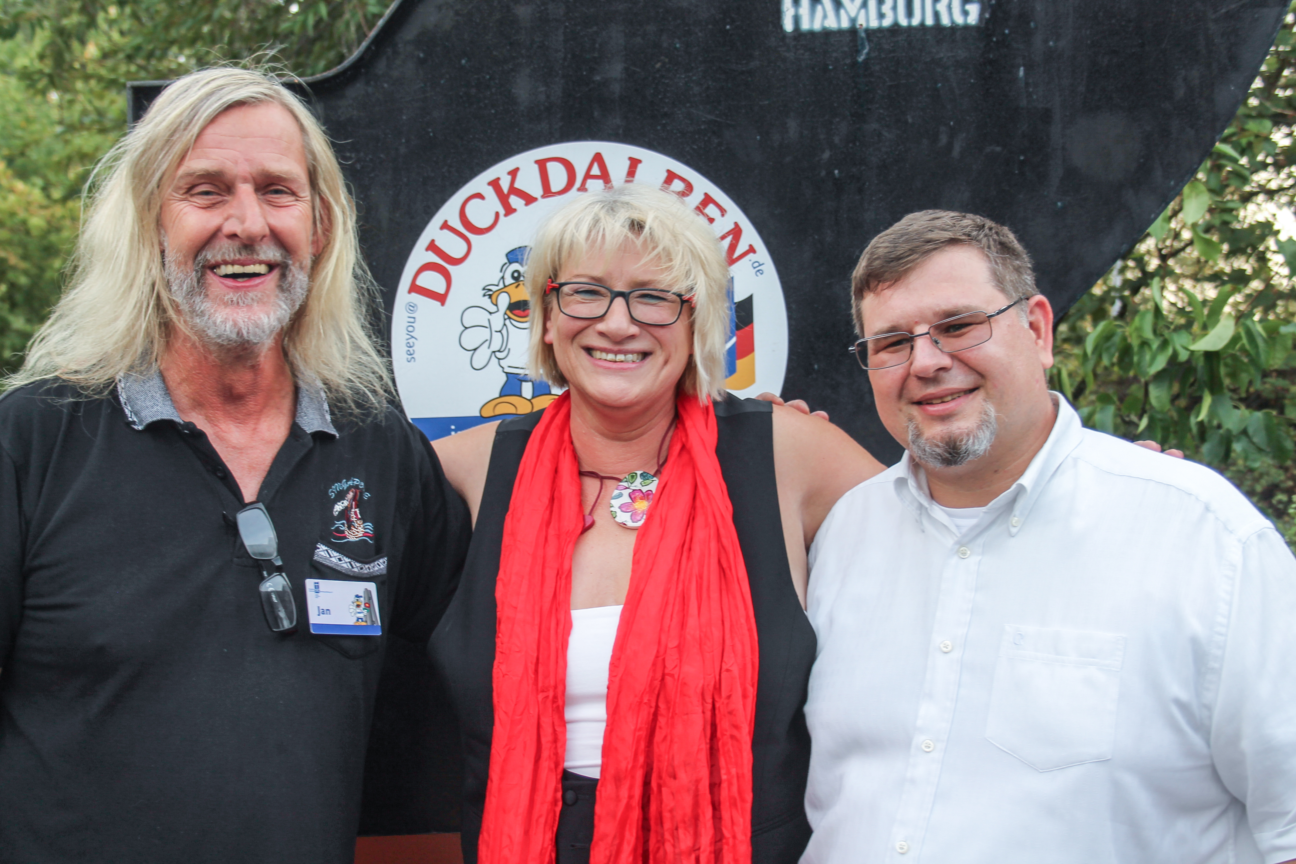 Leitung des Seemannsclub Duckdalben Anke Wibel und Jan Oltmanns und der Leiter der gemeinsamen Bordbetreuung im Hamburger Hafen Jörn Hille